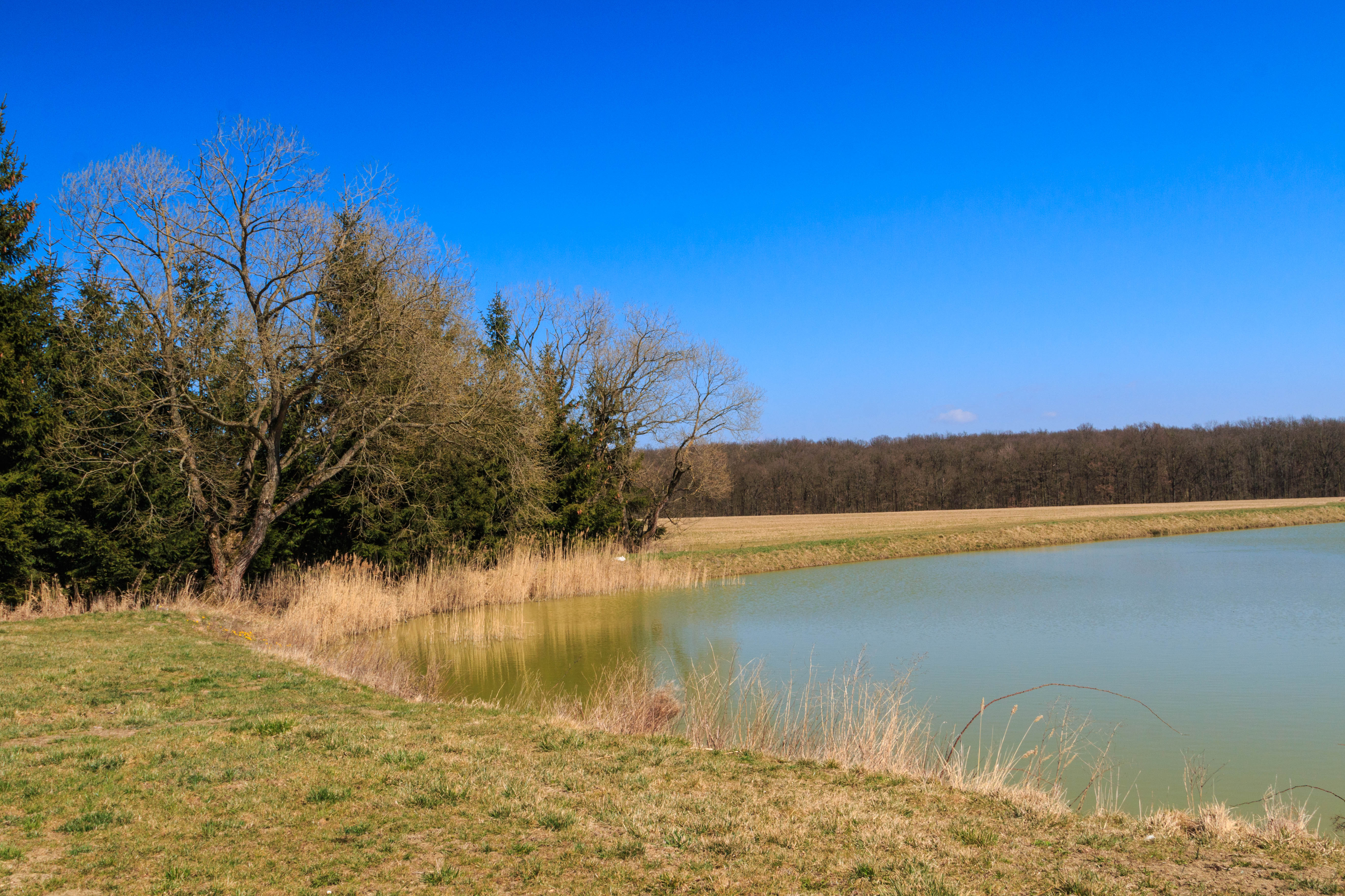 rybník Žabinec u Budína v okrese Hradec Králové Project: Vodstvo.